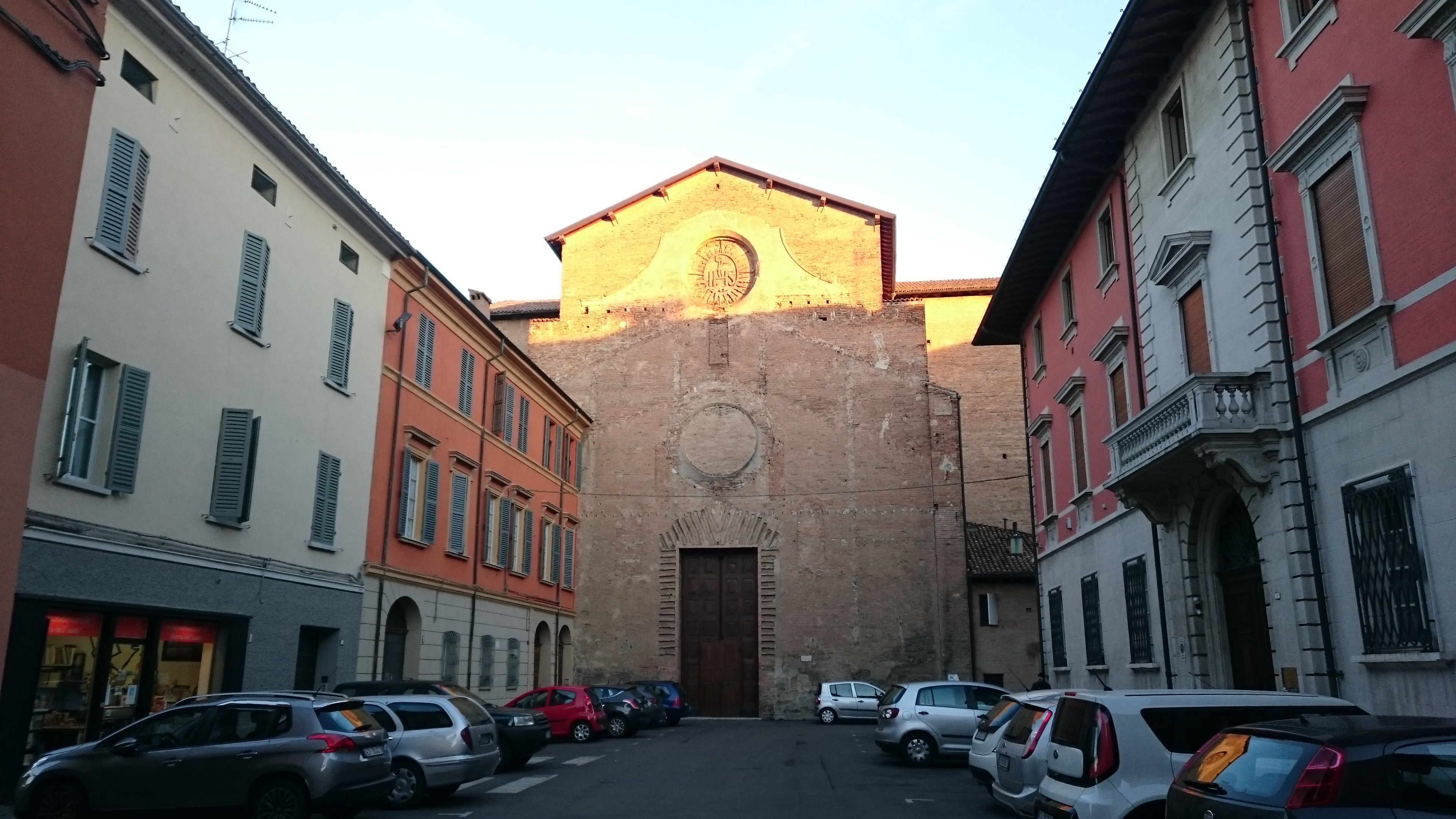 Chiesa e piazza di San Domenico a Reggio nell'Emilia